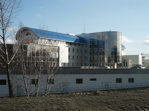 Фотография здания головного офиса БЕЛАГРОПРОМБАНК в Минске, построенного по проекту Карако